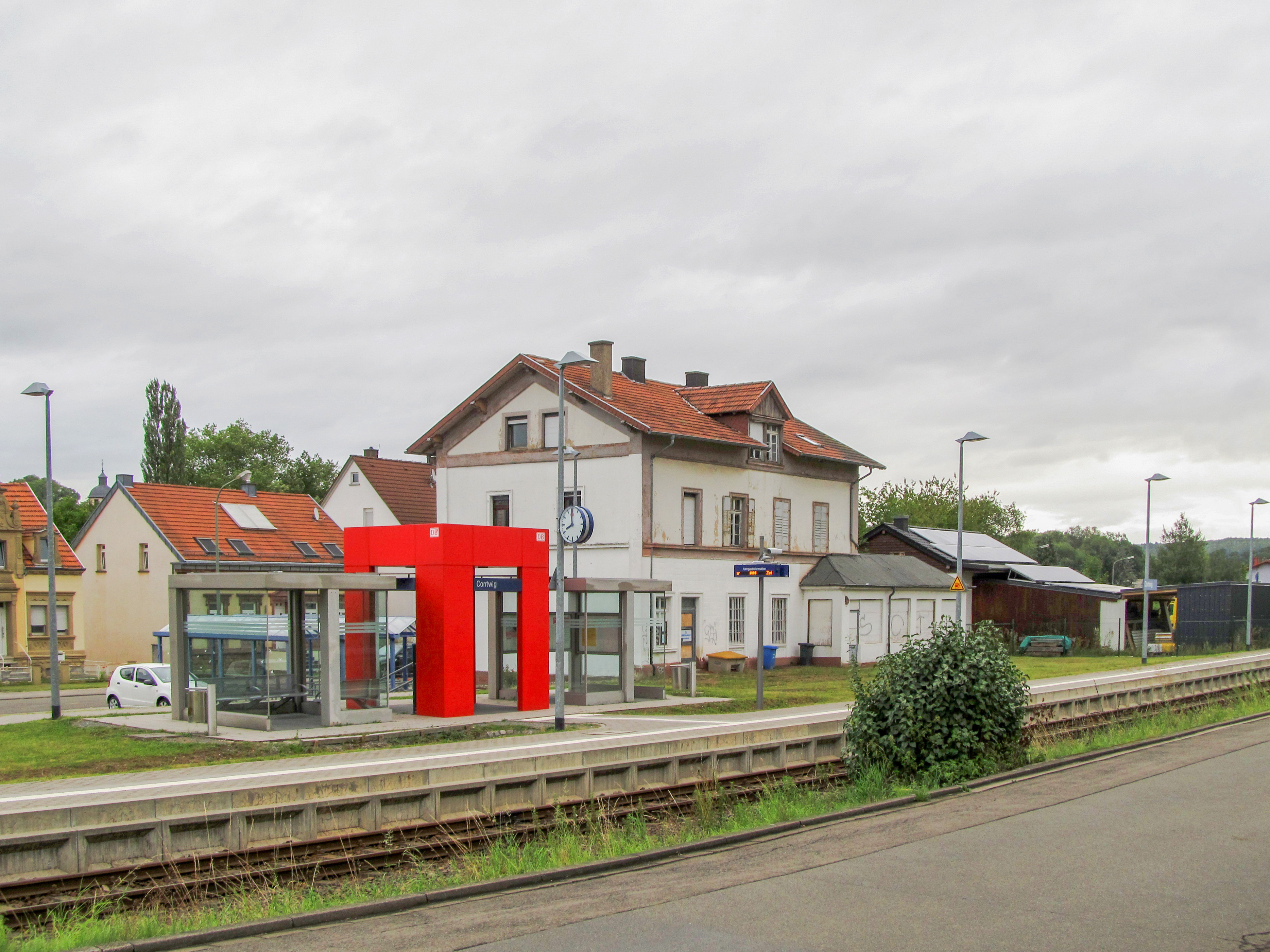 Bahnhof von Contwig, Kreis Südwestpfalz, Rheinland-Pfalz